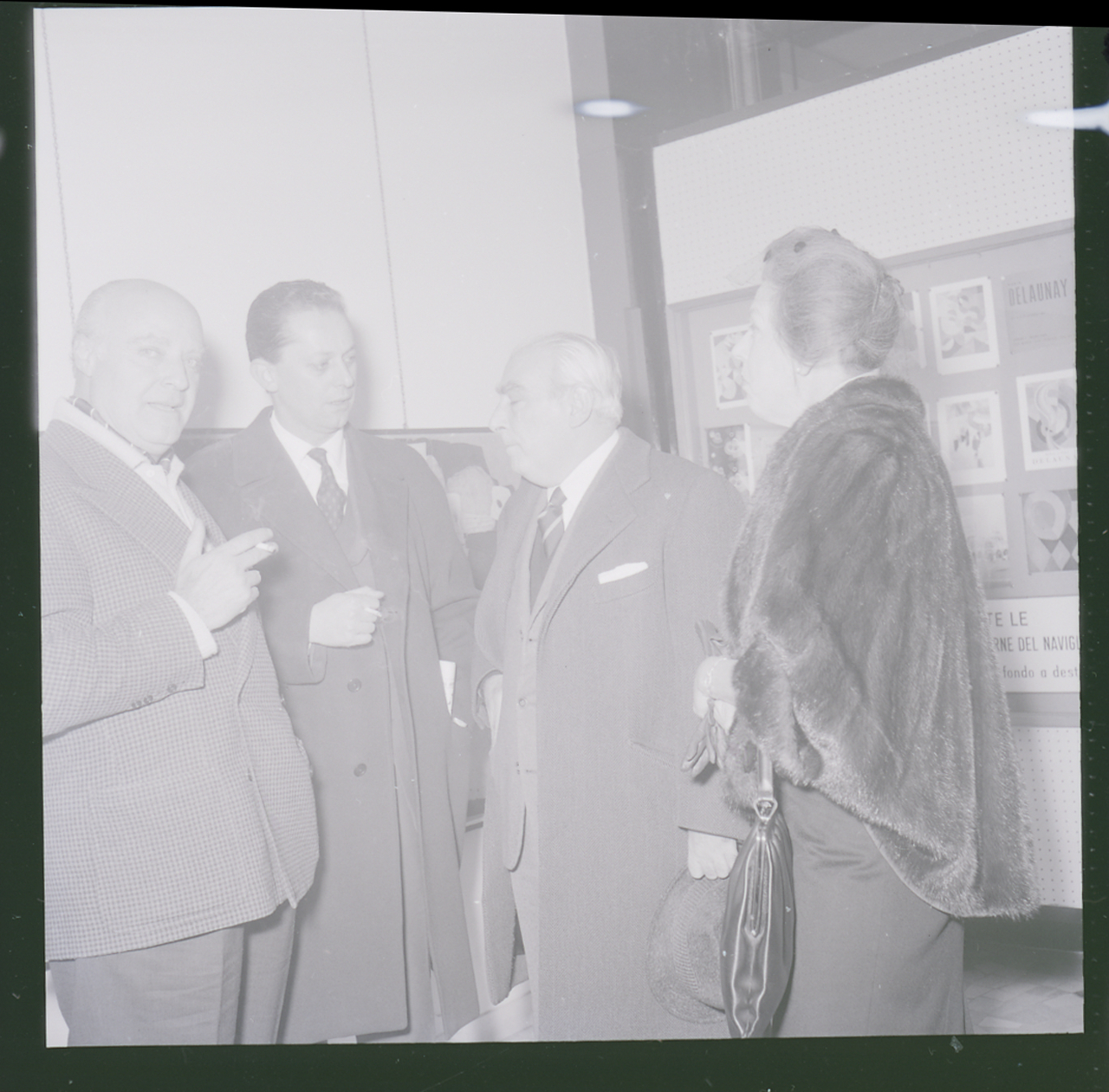 Servizio fotografico : Milano, 1962 / Paolo Monti. - Buste: 14, Fototipi: 14 : Negativo b/n, gelatina bromuro d'argento/ pellicola ; 6x6. - ((Serie costituita da 14 buste sciolte di negativi identificati con una doppia numerazione (da 48248 a 48261): 24701, 24702, 24703, 24704, 24705, 24706, 24707, 24708, 24709, 24710, 24711, 24712, 24713, 24714. . - La suddetta serie è contenuta nella scatola G24601-24800, formato 18x24, e identificata con la lettera "B", manoscritta a matita sul coperchio in basso a destra. - La mostra rimase aperta dal 24 novembre al 3 dicembre 1962. - Occasione: Documentazione dell'inaugurazione della mostra di Rosario Murabito alla Galleria del Naviglio e per pubblicazione: "Rosario Murabito", Milano, Galleria del Naviglio, 1962. - Fonte: Rubrica di Paolo Monti: Archivio fino 1-4-1961/ 31-3-1963 (1961-1963), presso Archivio Paolo Monti. - Fonte: Monografia: Rosario Murabito, Milano, Galleria del Naviglio (1962). 367.a mostra del Naviglio dal 24 novembre al 3 dicembre 1962, testo di Franco Russoli